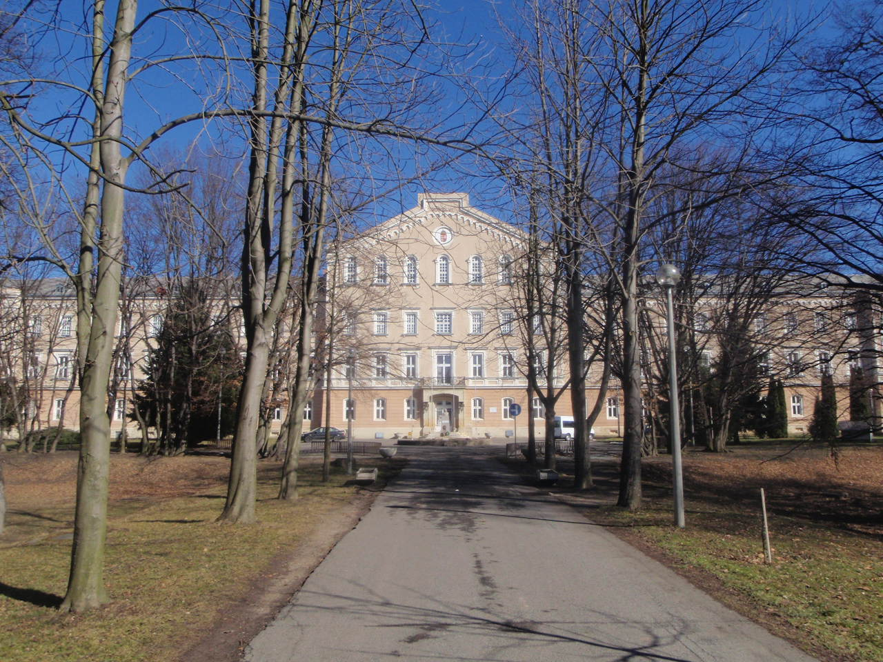 Institut für Heilpädagogik, Güns